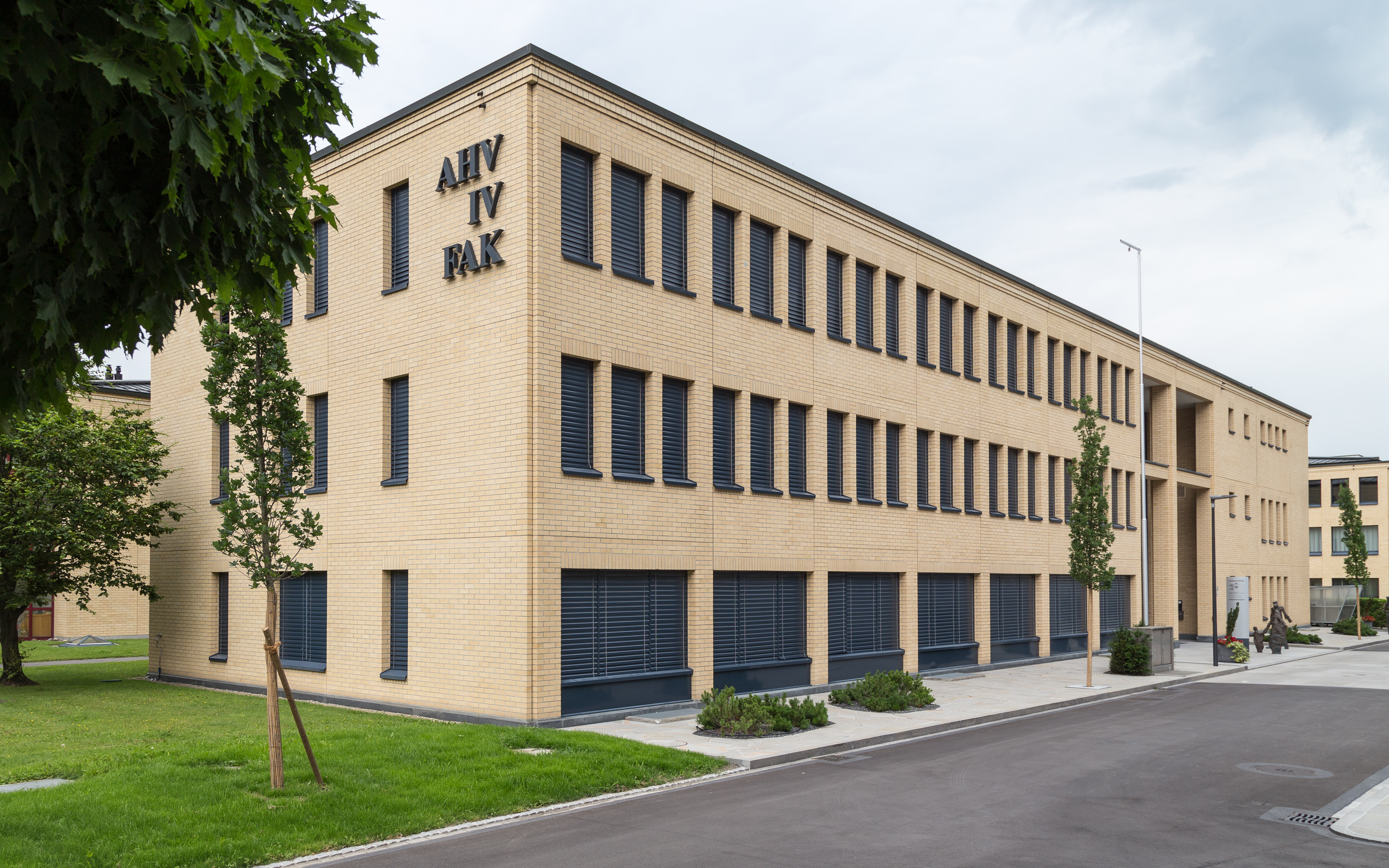 Gebäude der Sozialversicherungen "AHV IV FAK" in Vaduz (Liechtenstein)